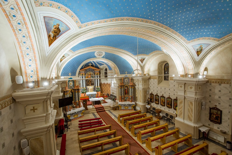 Unutrašnjost crkve Sv. Martina, Bošnjaci